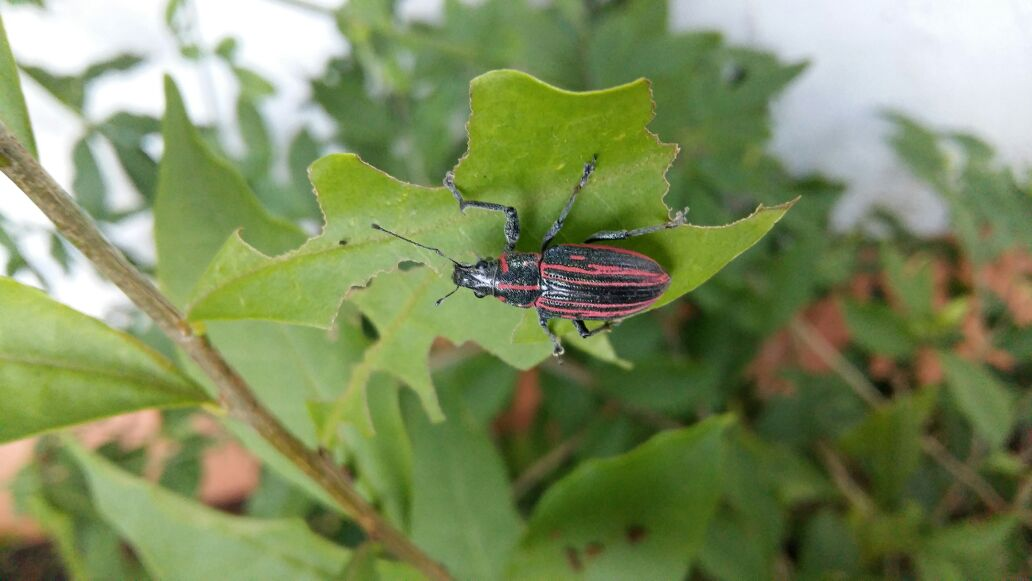 Foto tirada em Mairiporã - SP